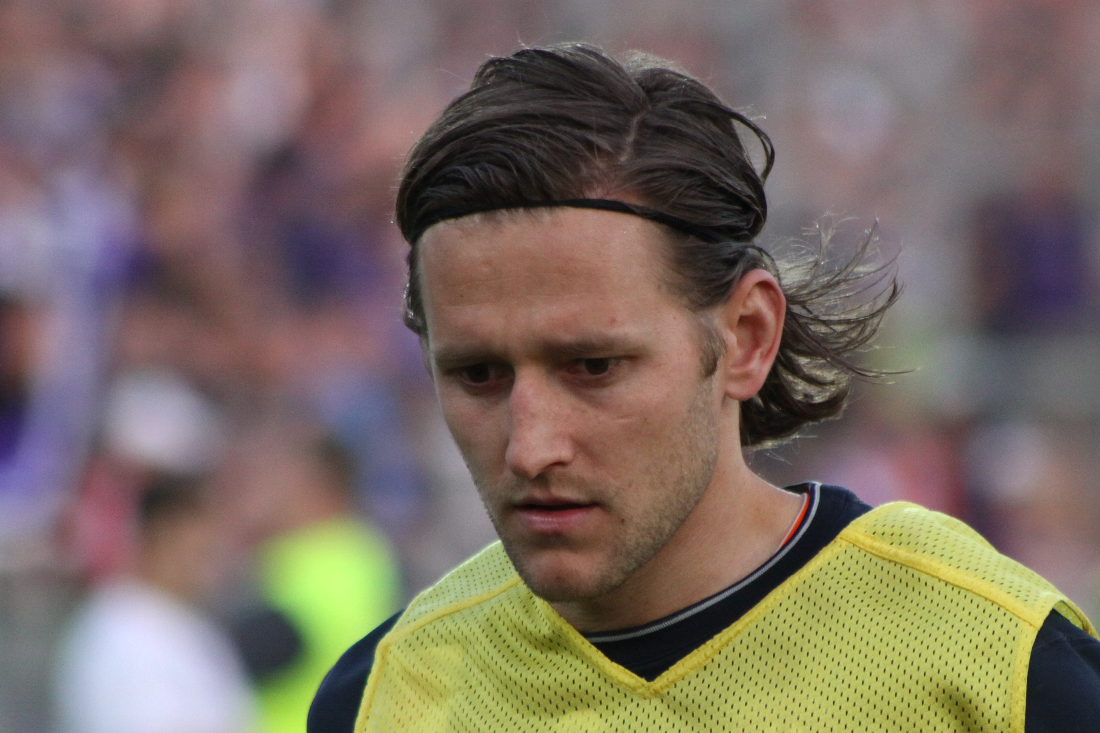 Matthias Hattenberger - FK Austria Wien